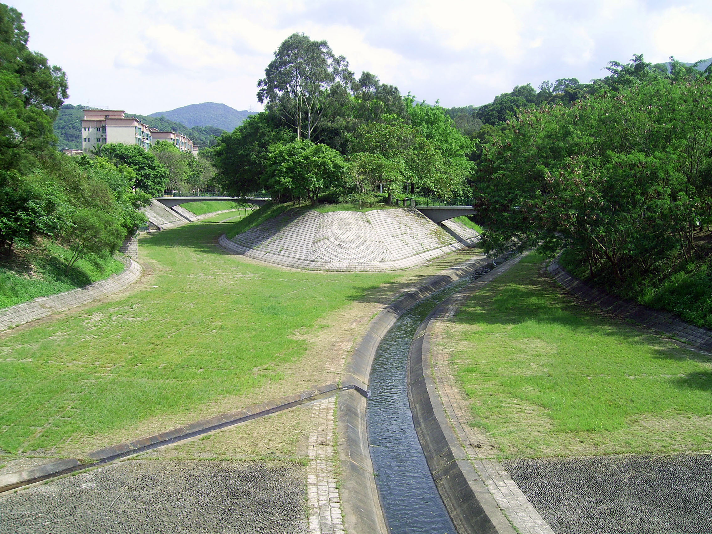 中文（香港）: 林村河